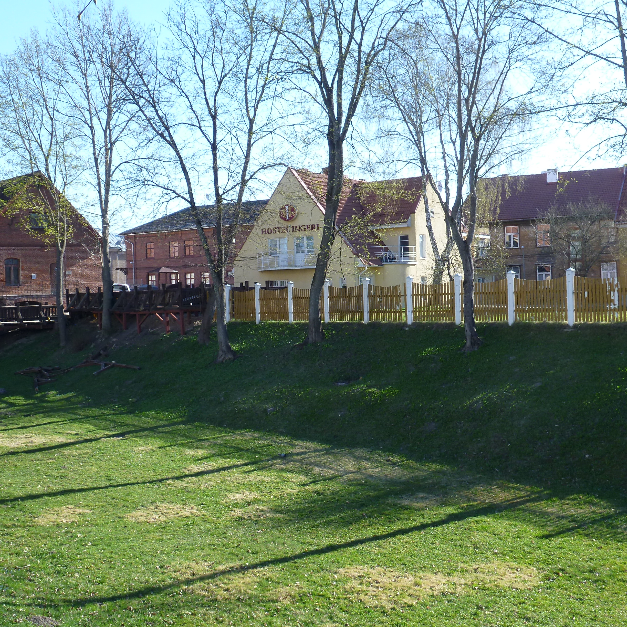 Hostel Inger Viljandin kaupungissa Virossa